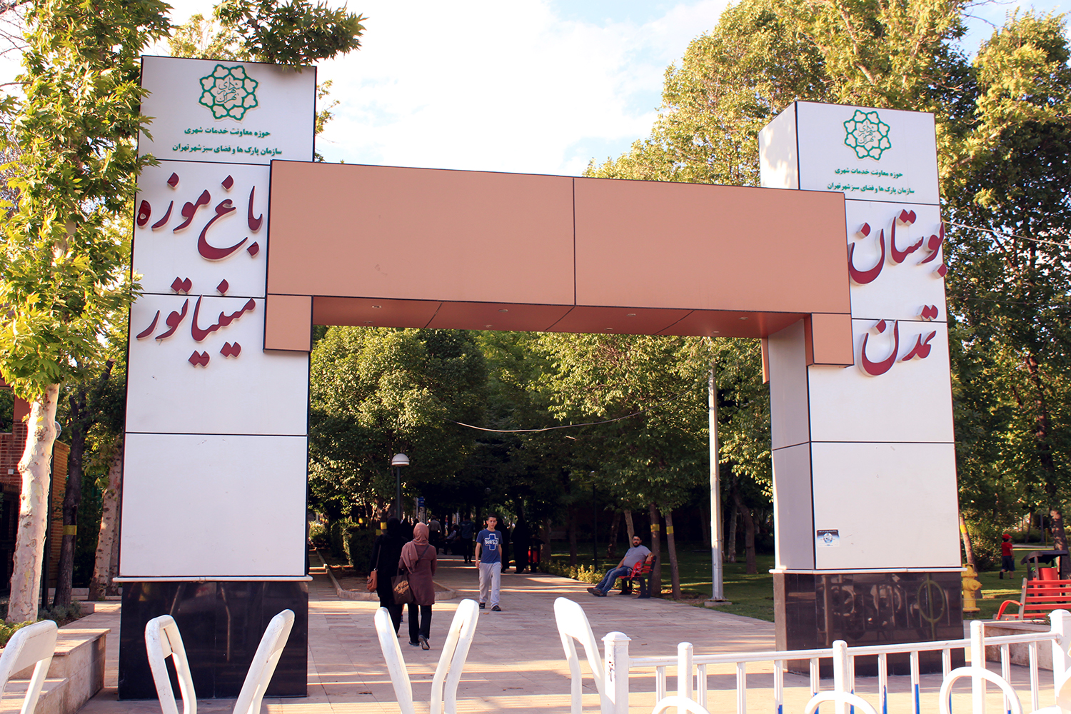 سر در بوستان گلبرگ (تمدن) و باغ موزه مينياتور تهران